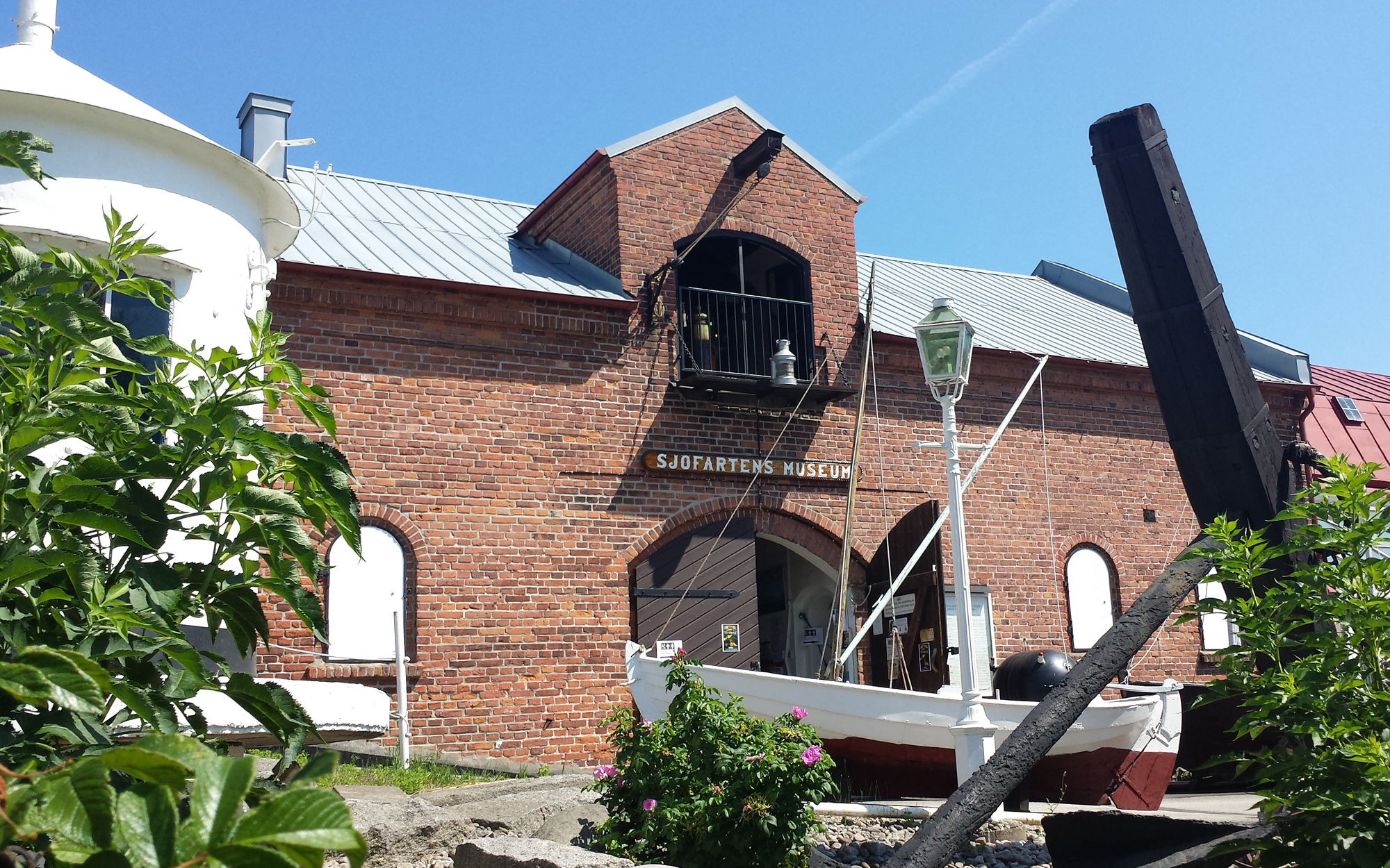 Blekinge Sjöfartsmuseum